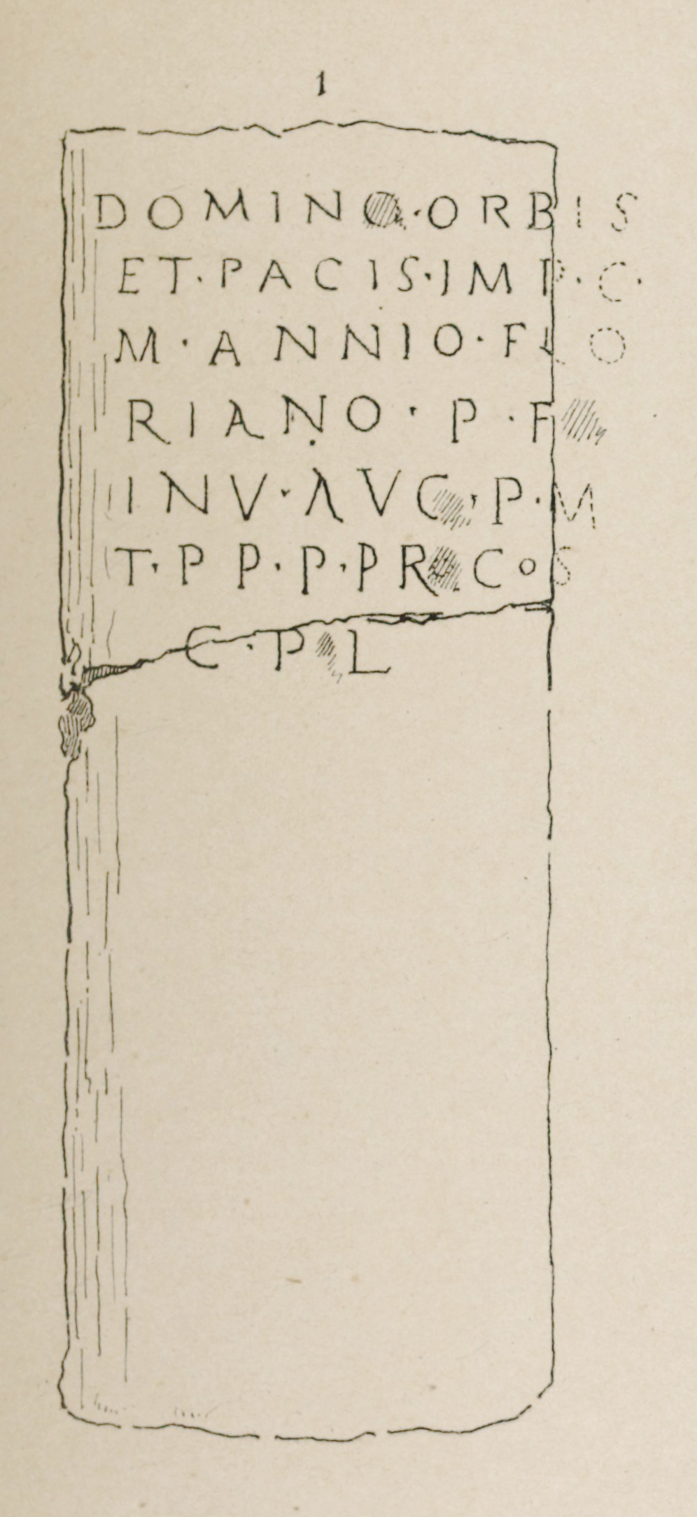 Figure 1 de la planche I (feuille 135), représentant la borne du Toulon trouvée en 1754, approximativement aux alentours de la source du ruisseau de Toulon (selon Jean Lebeuf, en 1756), ou plus au nord-est (selon Henry Wlgrin de Taillefer, en 1826), en direction du vallon passant au sud de Vignéras (donc peut-être sur la commune de Champcevinel). Elle porte une dédicace à l’empereur Florien de 276 et marquerait la première lieue depuis le sanctuaire entourant la Tour de Vésone. La pierre semble être conservée, depuis 2003, dans le nouveau musée gallo-romain de Périgueux, dit musée Vesunna.